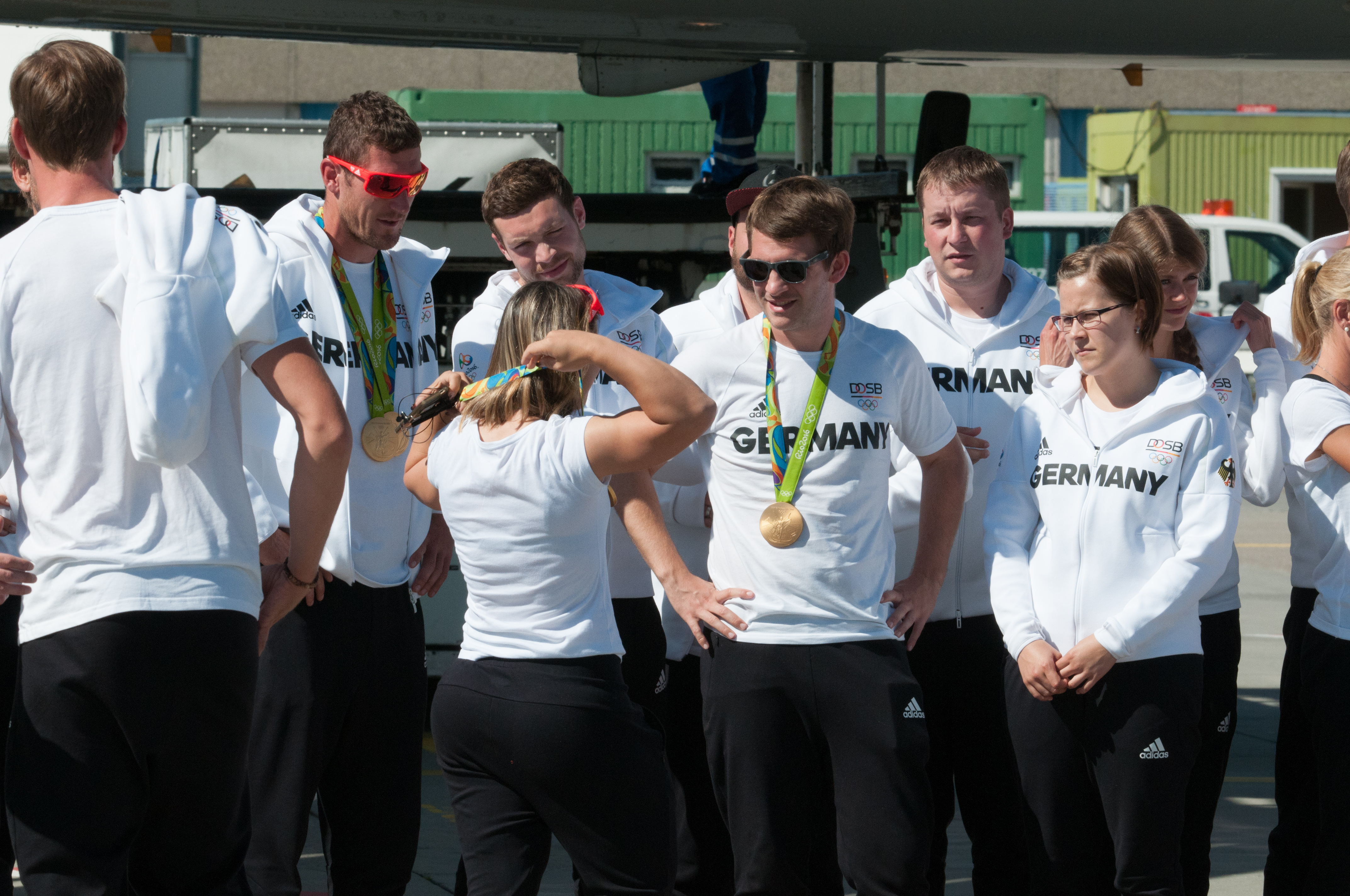 Empfang der deutschen Olympiamannschaft am Frankfurt Flughafen am 23. August 2016. Ankunft mit LH 511